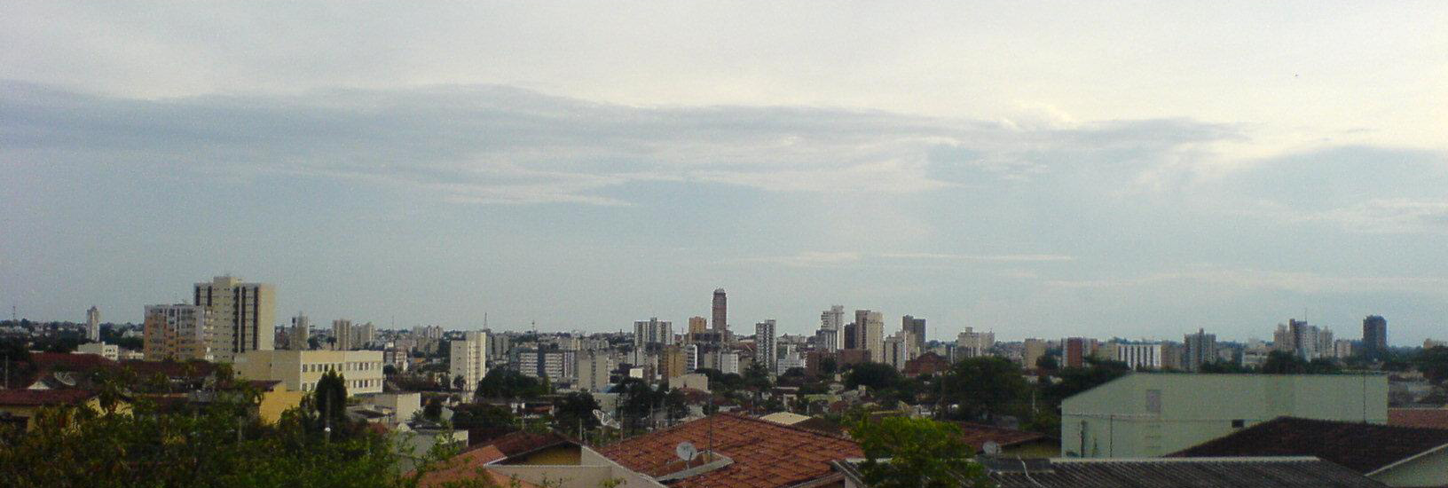 foto tirada por mim da sacada de minha casa